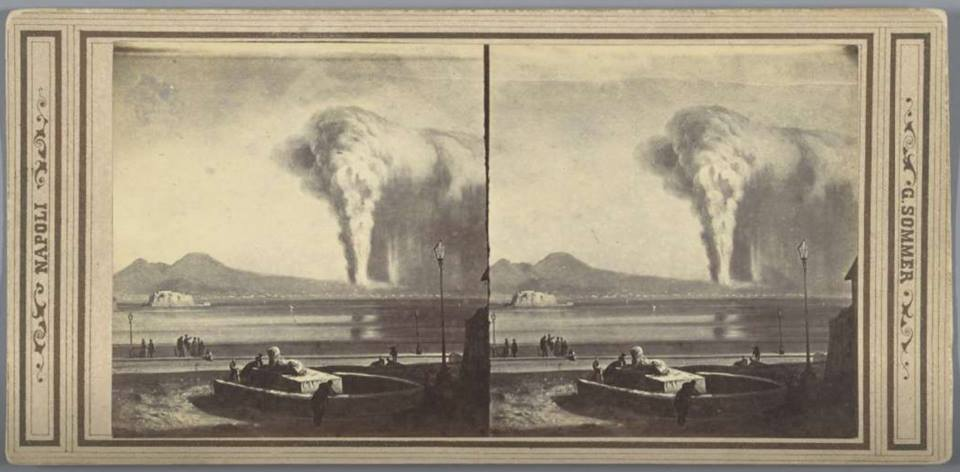 Giorgio Sommer (1834-1914) - Napoli, eruzione del Vesuvio del 1861 vista da Mergellina, Fontana del Leone. Foto di un dipinto di artista sconosciuto. Numero di catalogo sconosciuto.